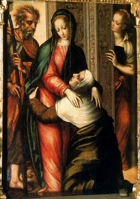 La Visitaciónlabel QS:Les,"La Visitación"